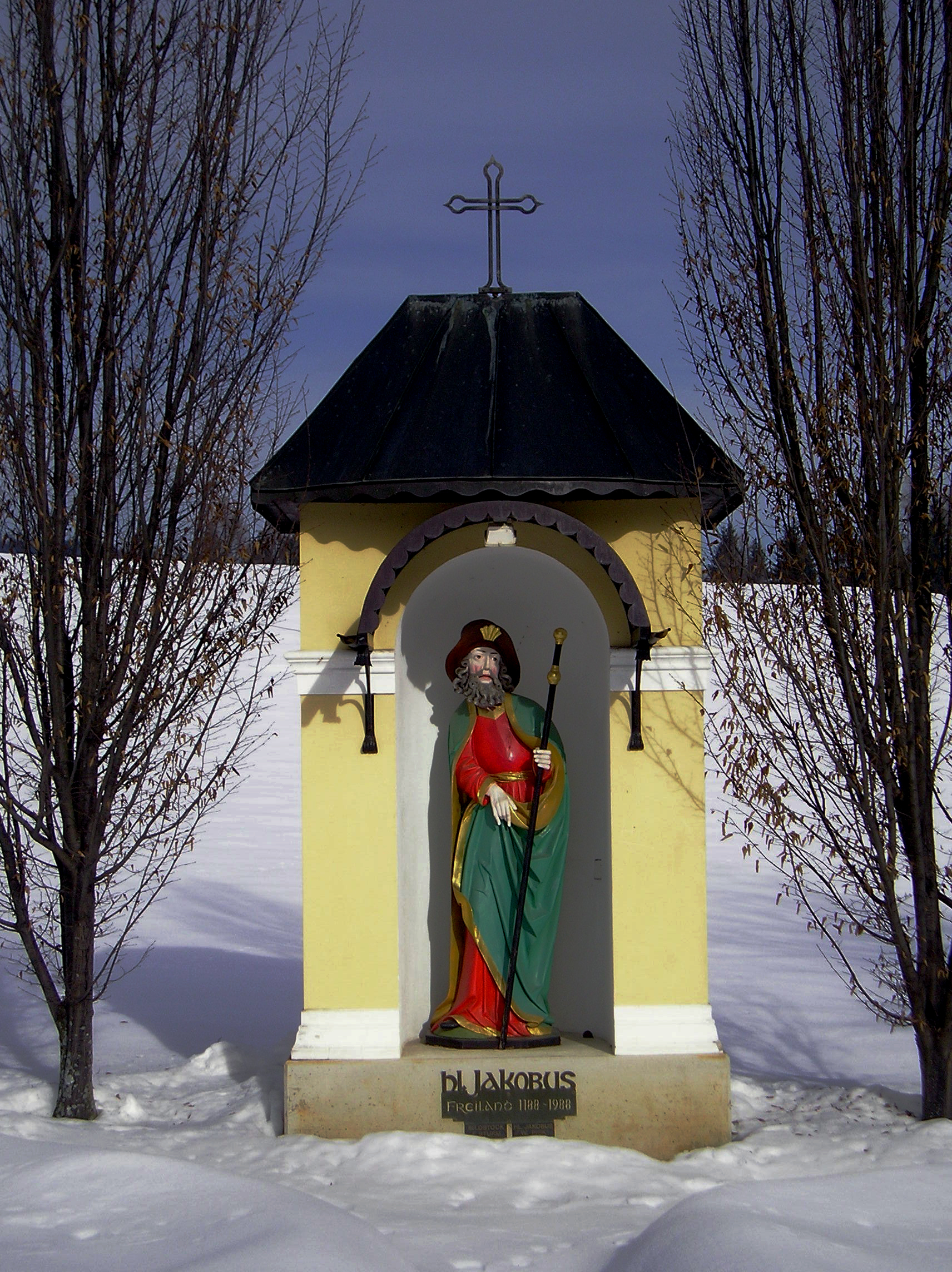 Bildstock des heilligen Jakobus d. Älteren.